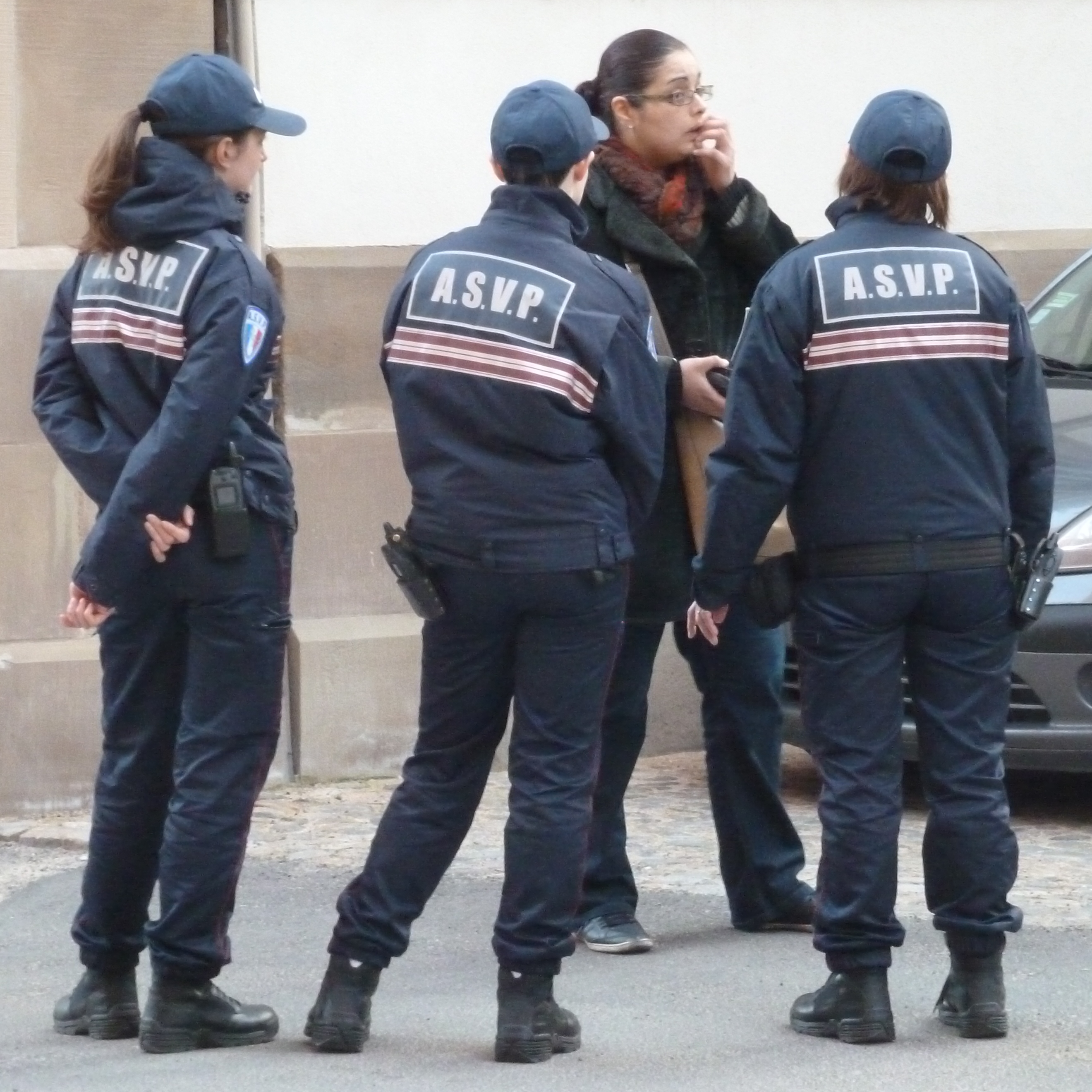 Agent de surveillance de la voie publique à Strasbourg